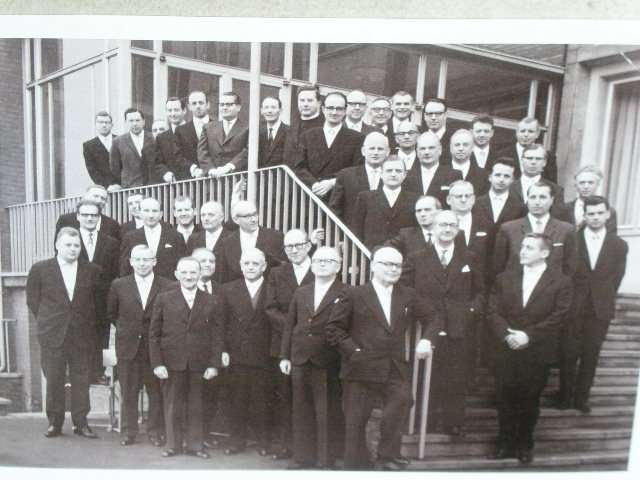 Lehrer des Gymnasiums am Wirteltor